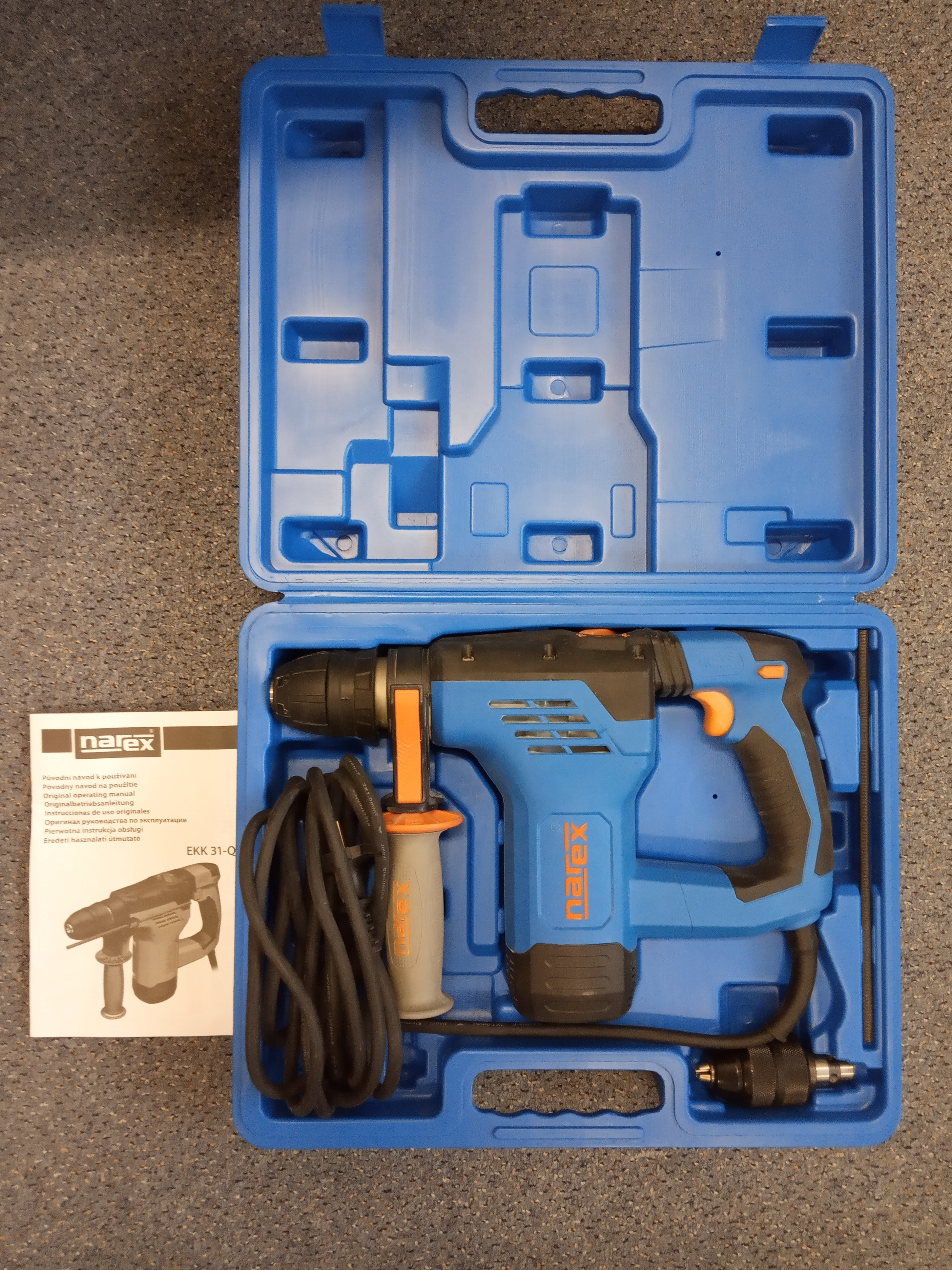 Narex - vrtací kladivo EKK 31 QS